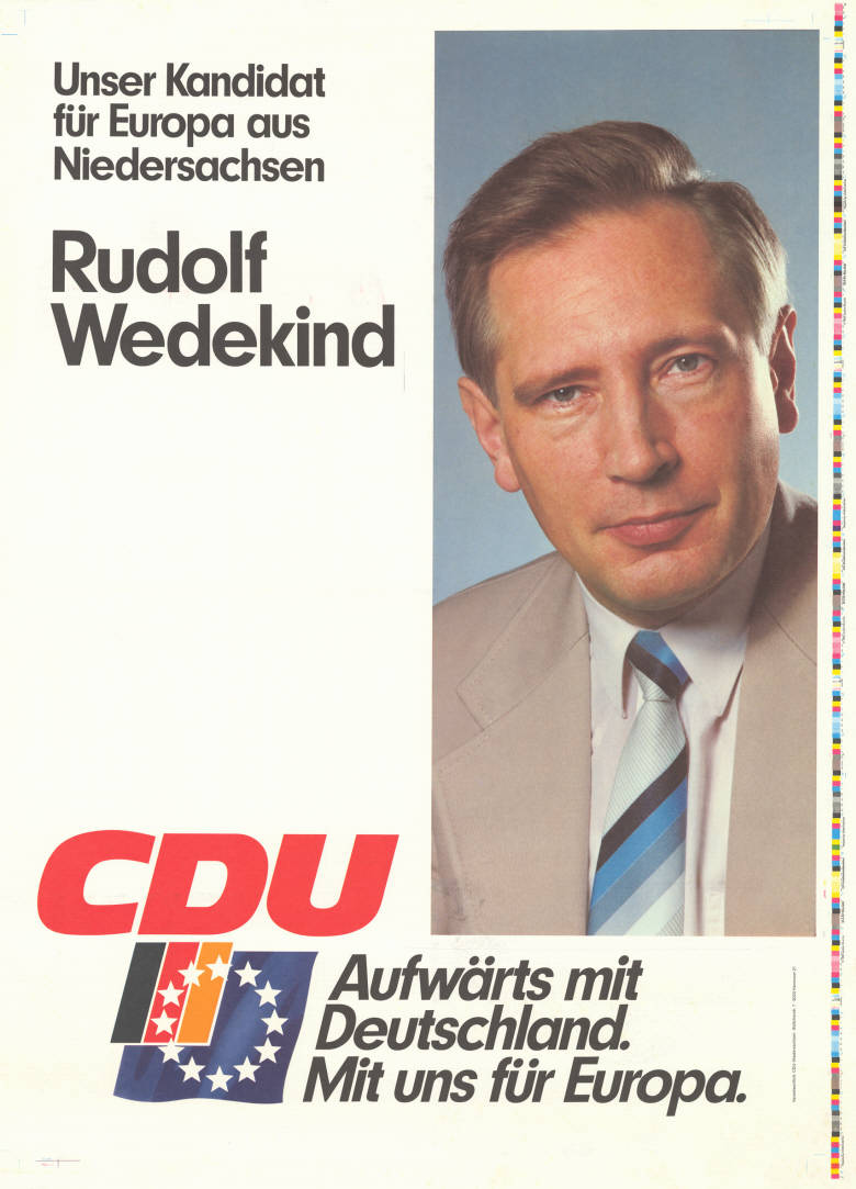 Unser Kandidat für Europa aus Niedersachsen Rudolf Wedekind CDU Aufwärts mit Deutschland. Mit uns für Europa. Abbildung: Porträtfoto Plakatart: Kandidaten-/Personenplakat mit Porträt Auftraggeber: Verantw.: CDU-Niedersachsen, Hannover Objekt-Signatur: 10-030 : 170 Bestand: Europawahlplakate (10-030) GliederungBestand10-18: Europawahlplakate (10-030) » Europawahl am 17.6.1984 » CDU Lizenz: KAS/ACDP 10-030 : 170 CC-BY-SA 3.0 DE